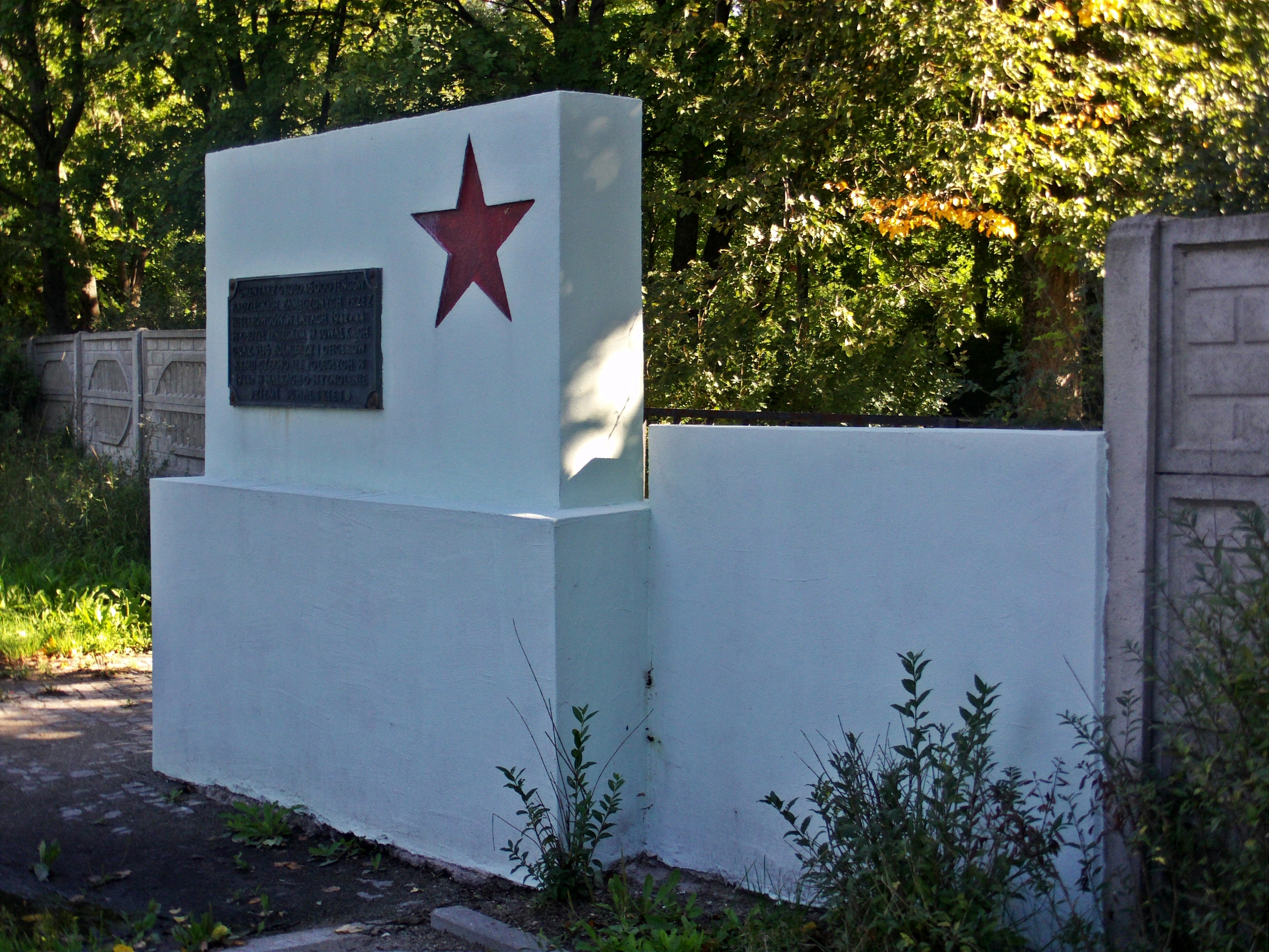 Suwałki - Cmentarz Żołnierzy Radzieckich, główna brama widziana od frontu. (zabytek nr A-832 z 26.08.1991)